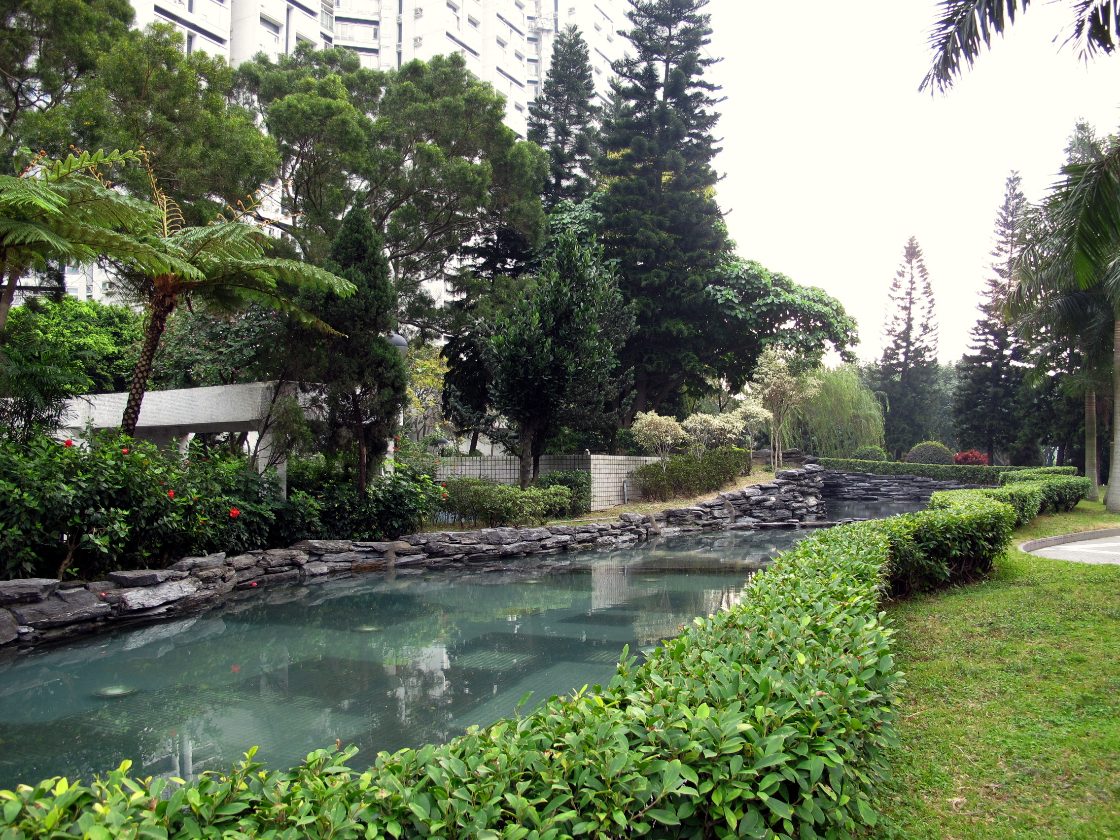 Laguna Park Pond 麗港公園